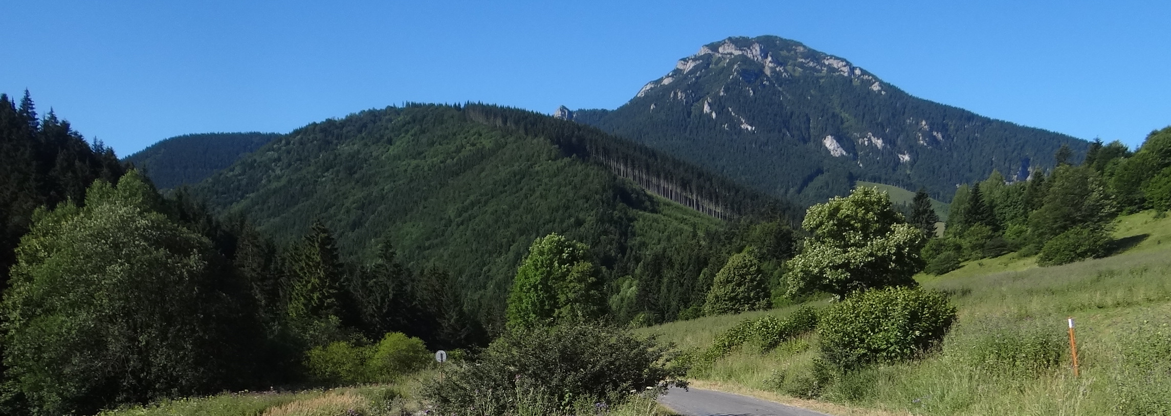 Widok spod przełęczy Vrchvarta